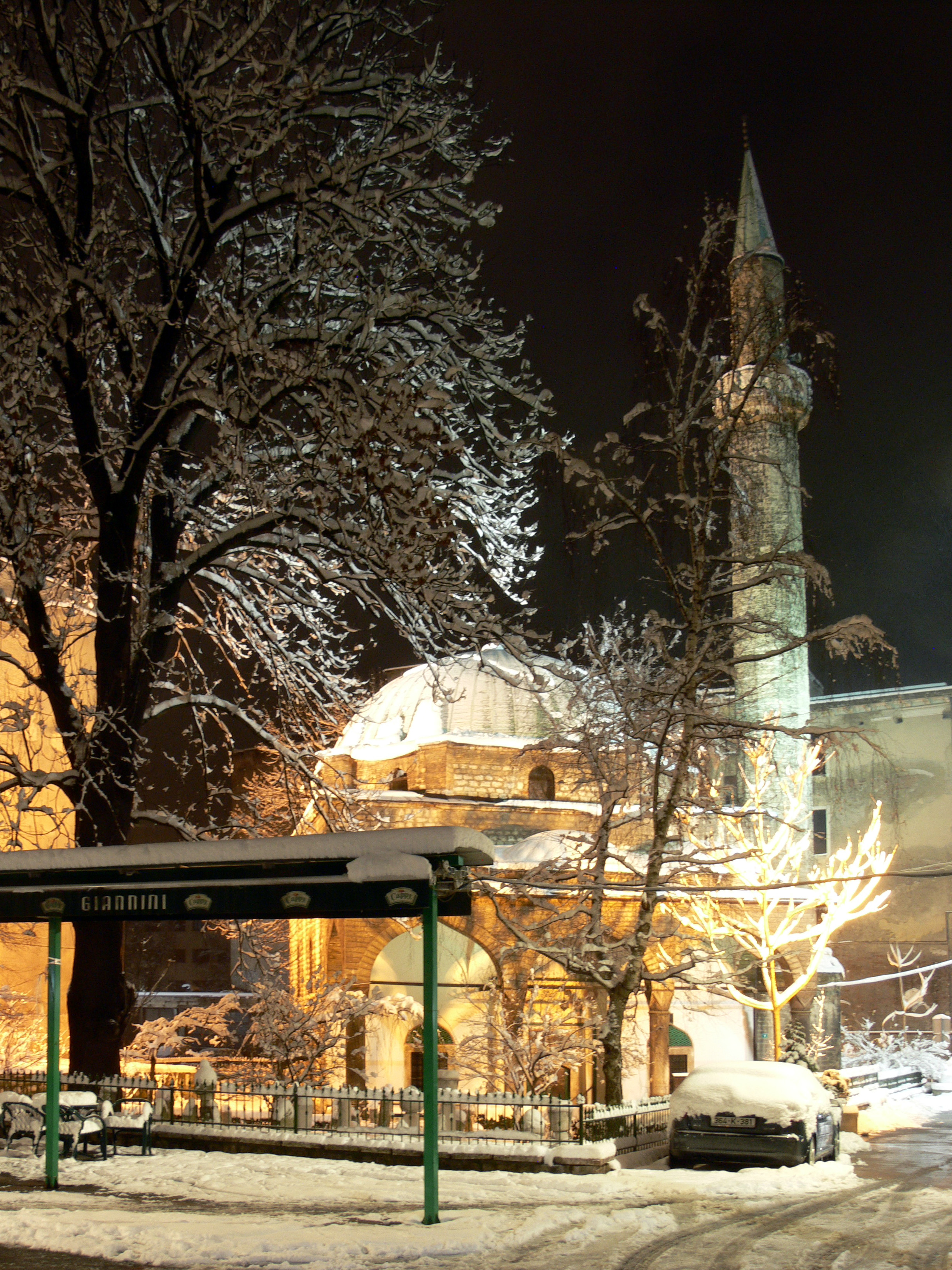 The Ferhad-begova-Mosque in Sarajevo.